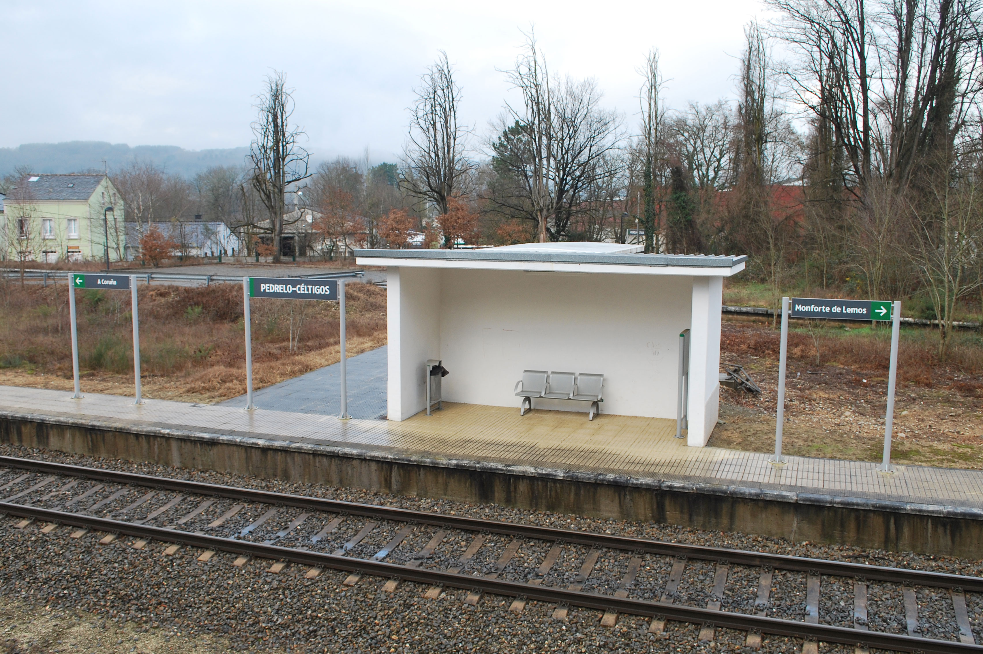 Vista do apeadoiro de Pedrelo Céltigos.